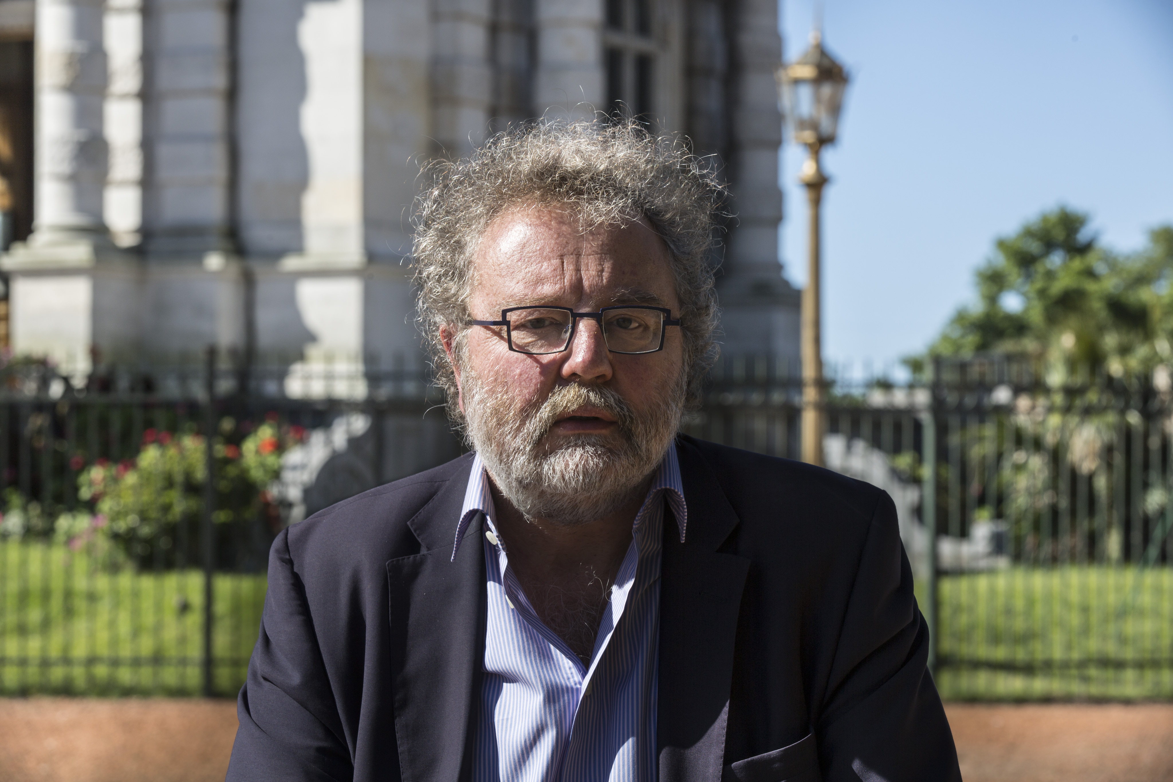 Buenos Aires, 18 de noviembre de 2016 - El periodista y escritor británico, John Carlin.